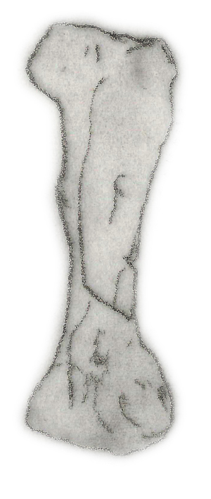 Illustration of a fossil of Niobrarasaurus